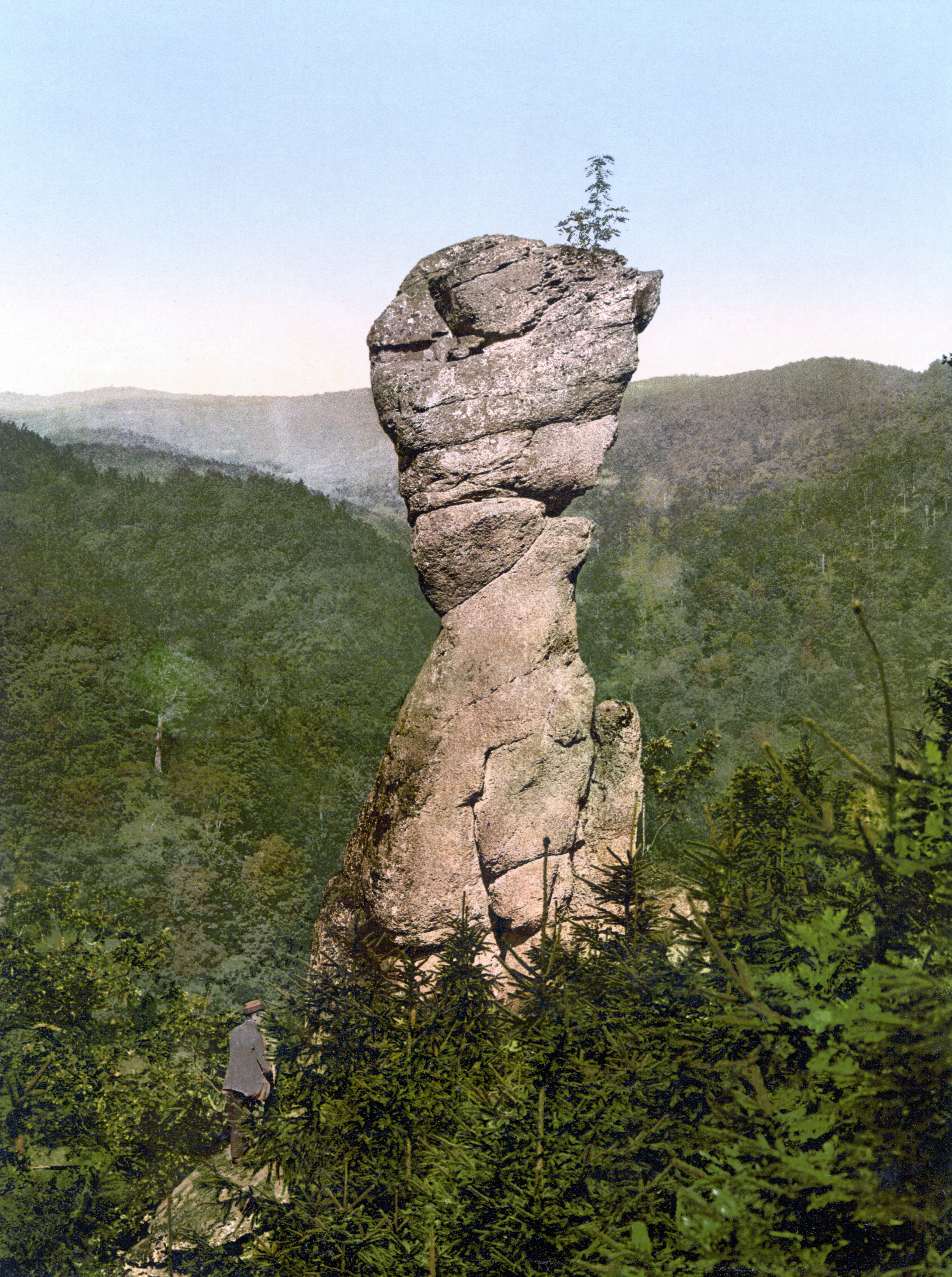 „Entenschnabel“ (auch „Gänseschnabel“ genannt) im Ilfelder Tal nahe Ilfeld, Harz, Deutschland.